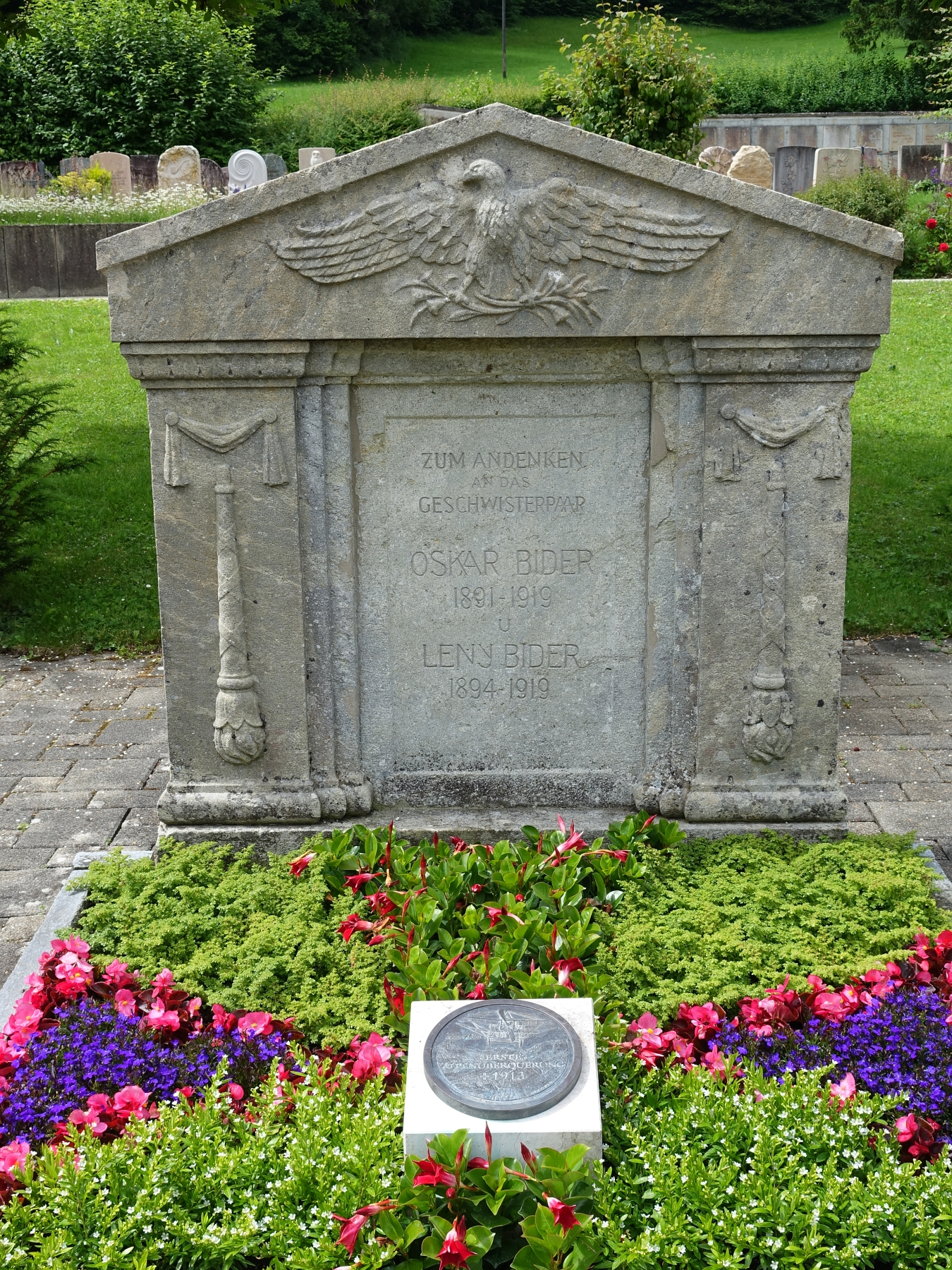 Oskar Bider (1891–1919) Flugpionier. Leny, Julie Helene Bider (1894–1919) Stummfilm-Schauspielerin. Grab auf dem Friedhof von Langenbruck, Basel-Land, Schweiz.